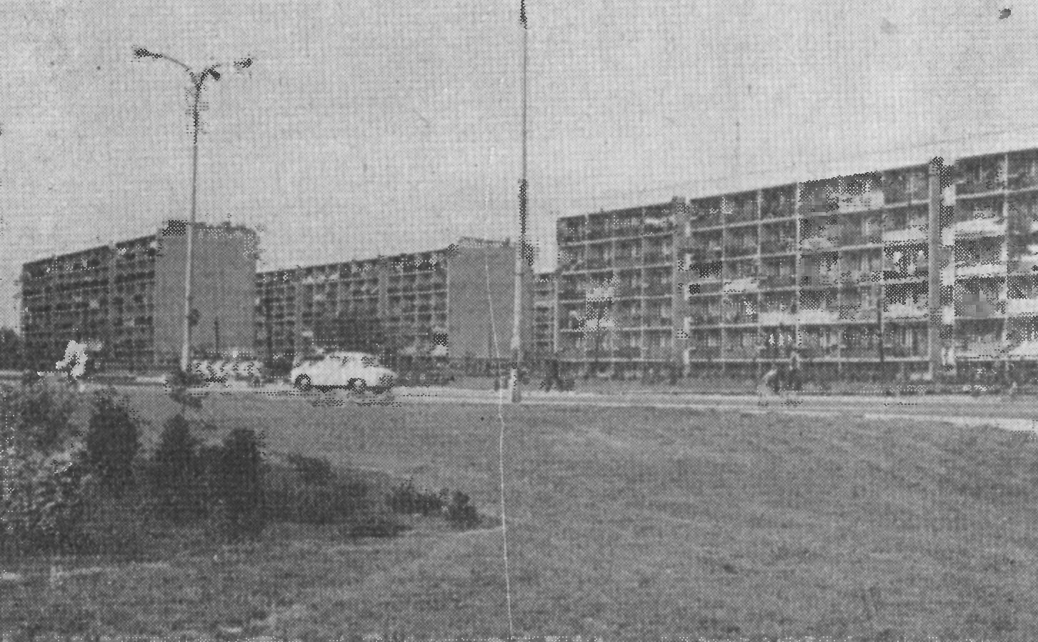 Os. Oświecenia w 1973 roku. Widoczny fragment ul. Ostrowskiej; od prawej - blok 29-34